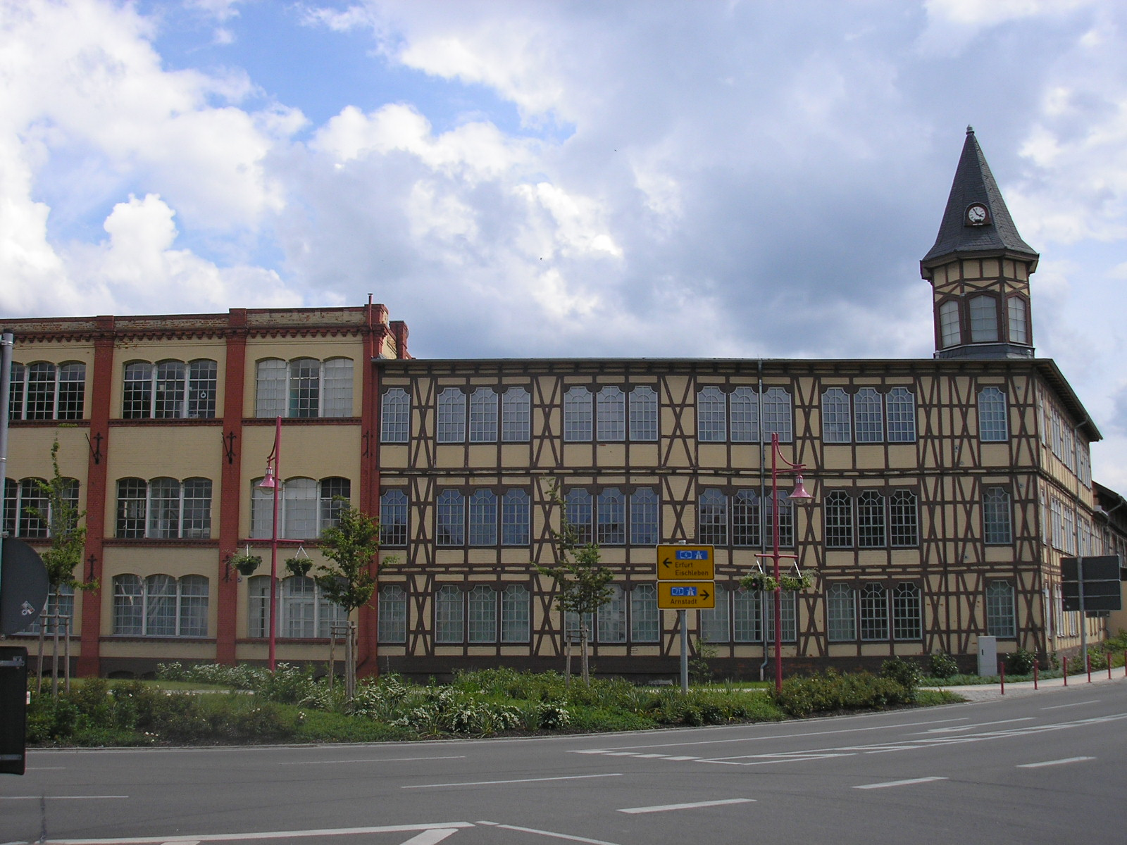 Das (ehemalige) Nadelwerk in Ichtershausen (Ilm-Kreis; Thüringen)